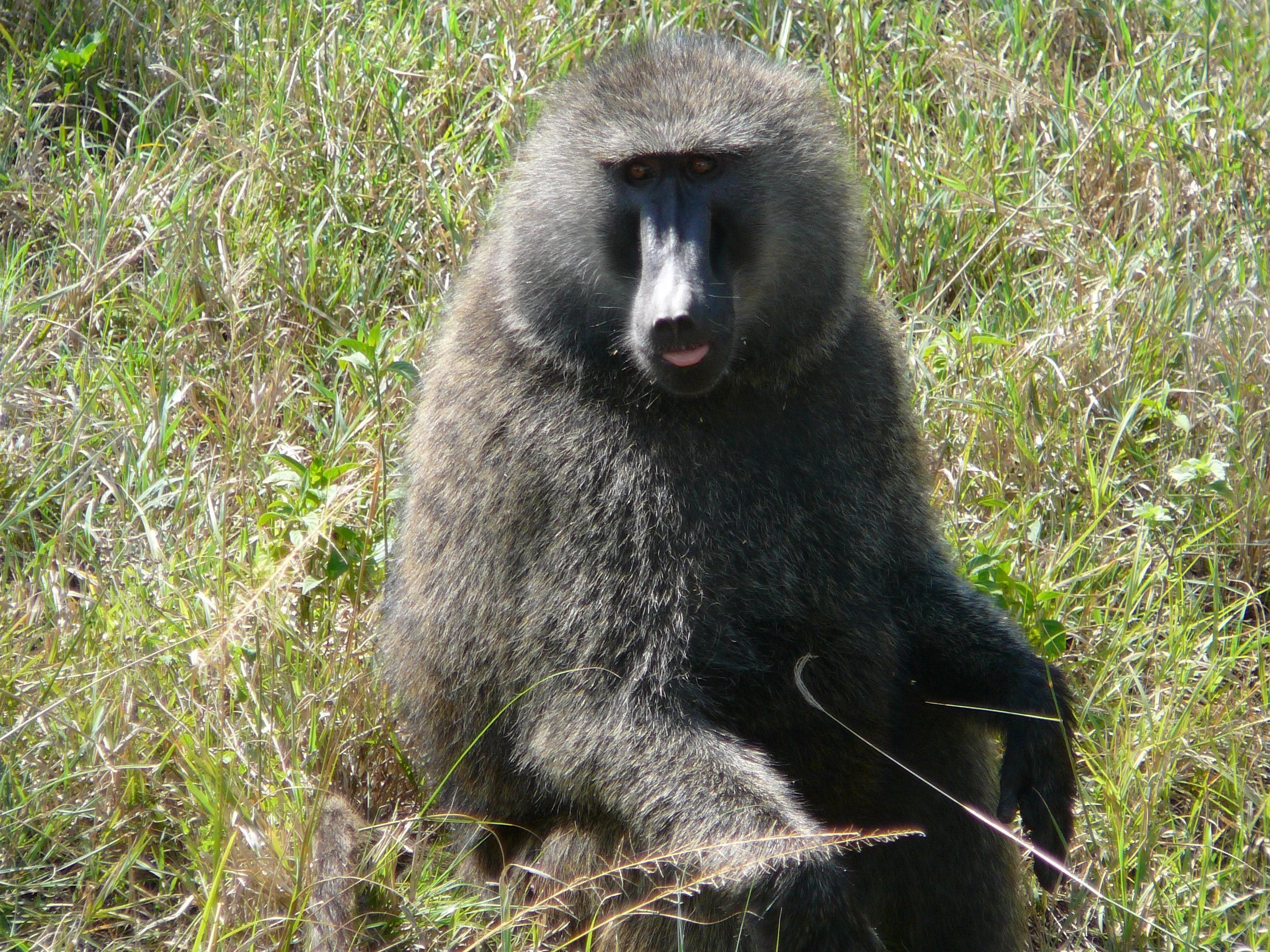 Olive Baboon (Papio anubis) in Kenya